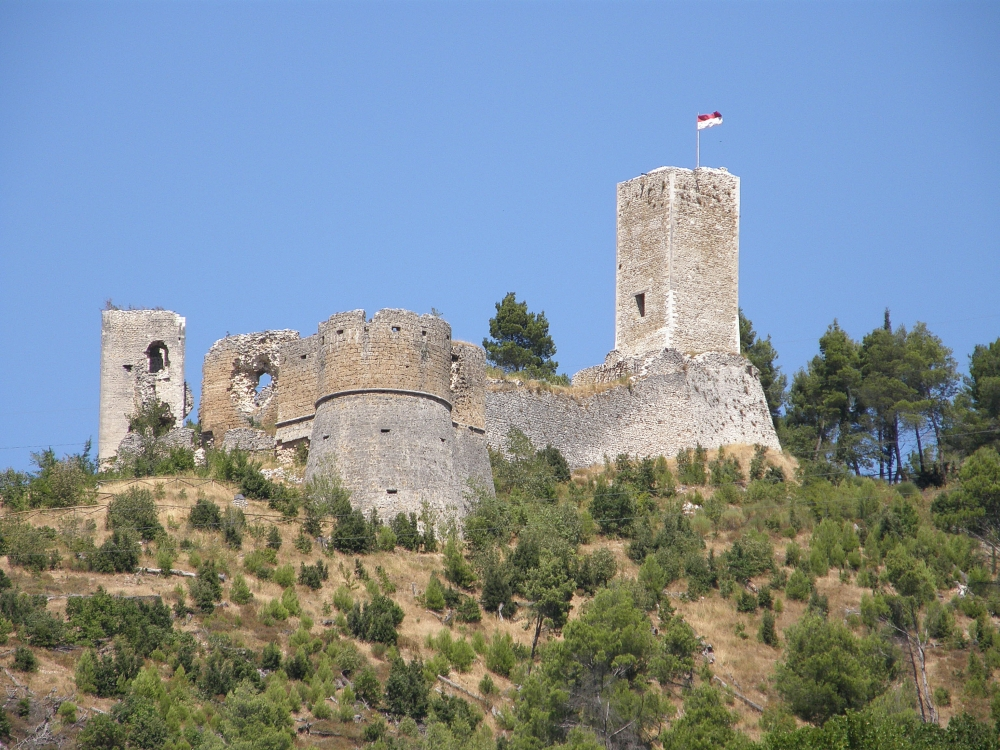 Popoli